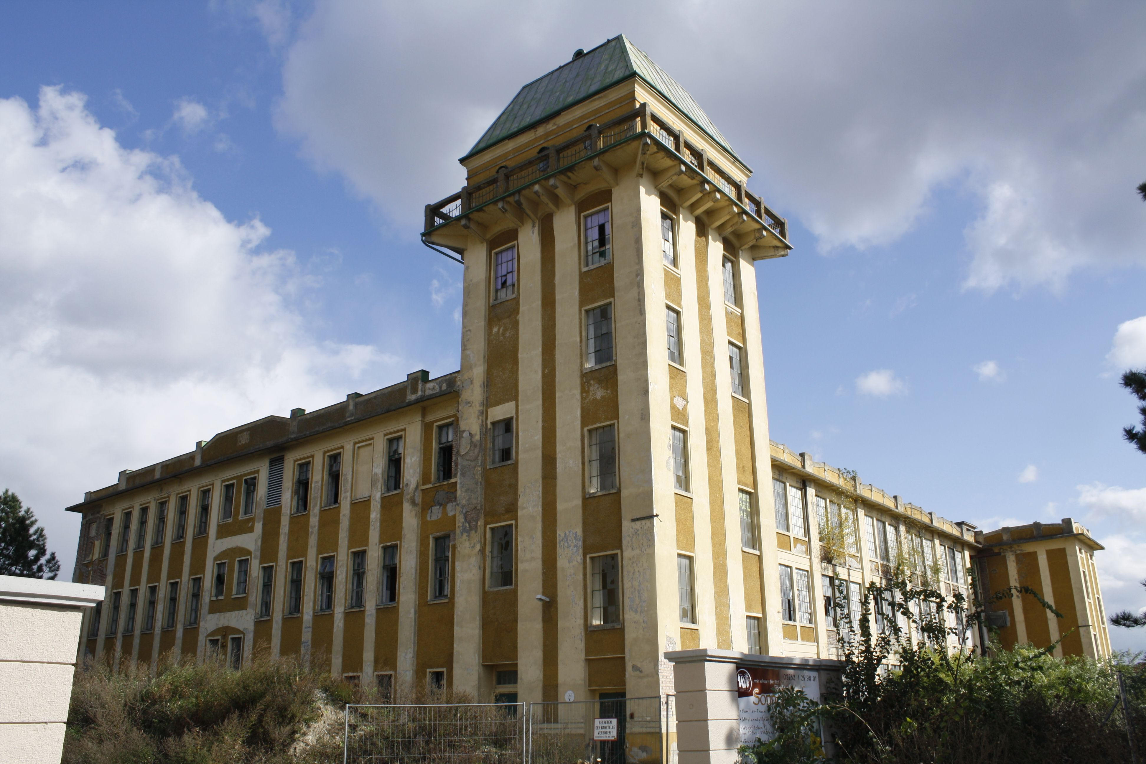 Fabriksgebäude der ehemaligen Spinnerei Teesdorf